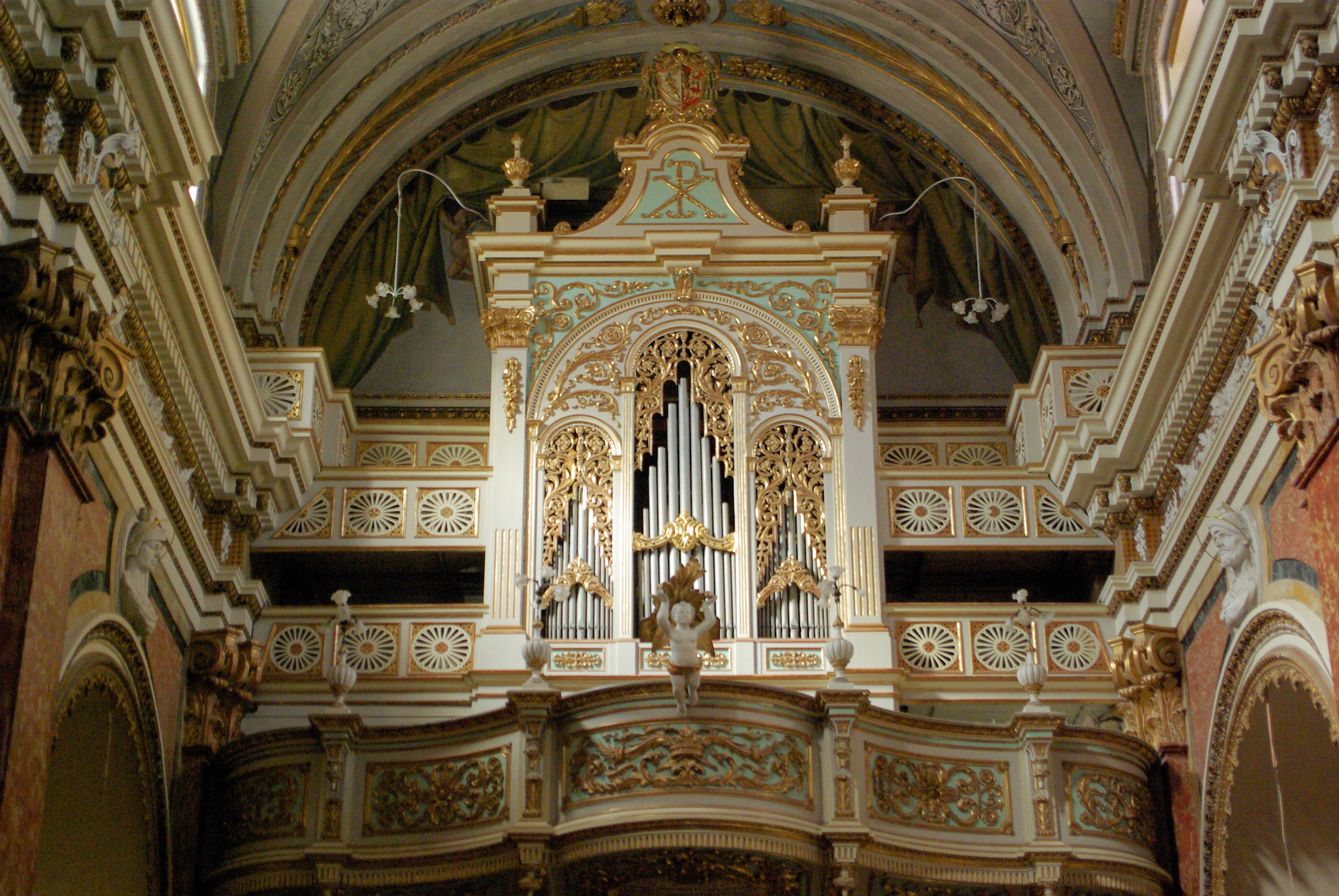 Malta, Vittoriosa, St. Lorenz Kirche